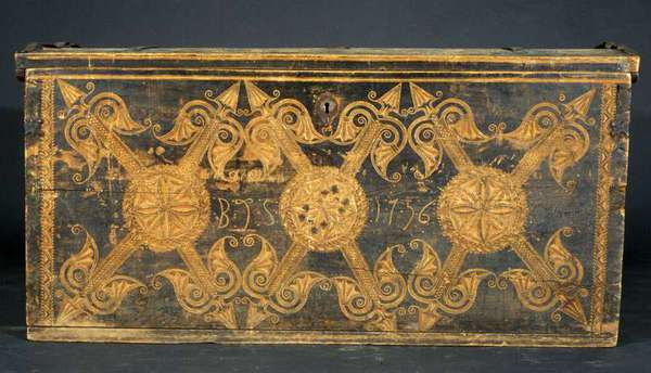 Kiste datert 1756. Dekorert med karveskurd. Norsk Folkemuseum, NF.1911-1131.